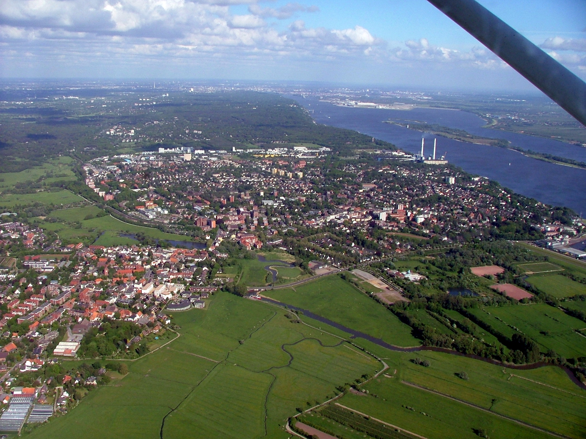 Luftaufnahme der Umgebung Wedels Sichtbar sind u. a. der S-Bahnhof, das Kraftwerk, die Elbe mit der Insel Schweinesand und dem Mühlenberger Loch und die Stadt Hamburg am Horizont.